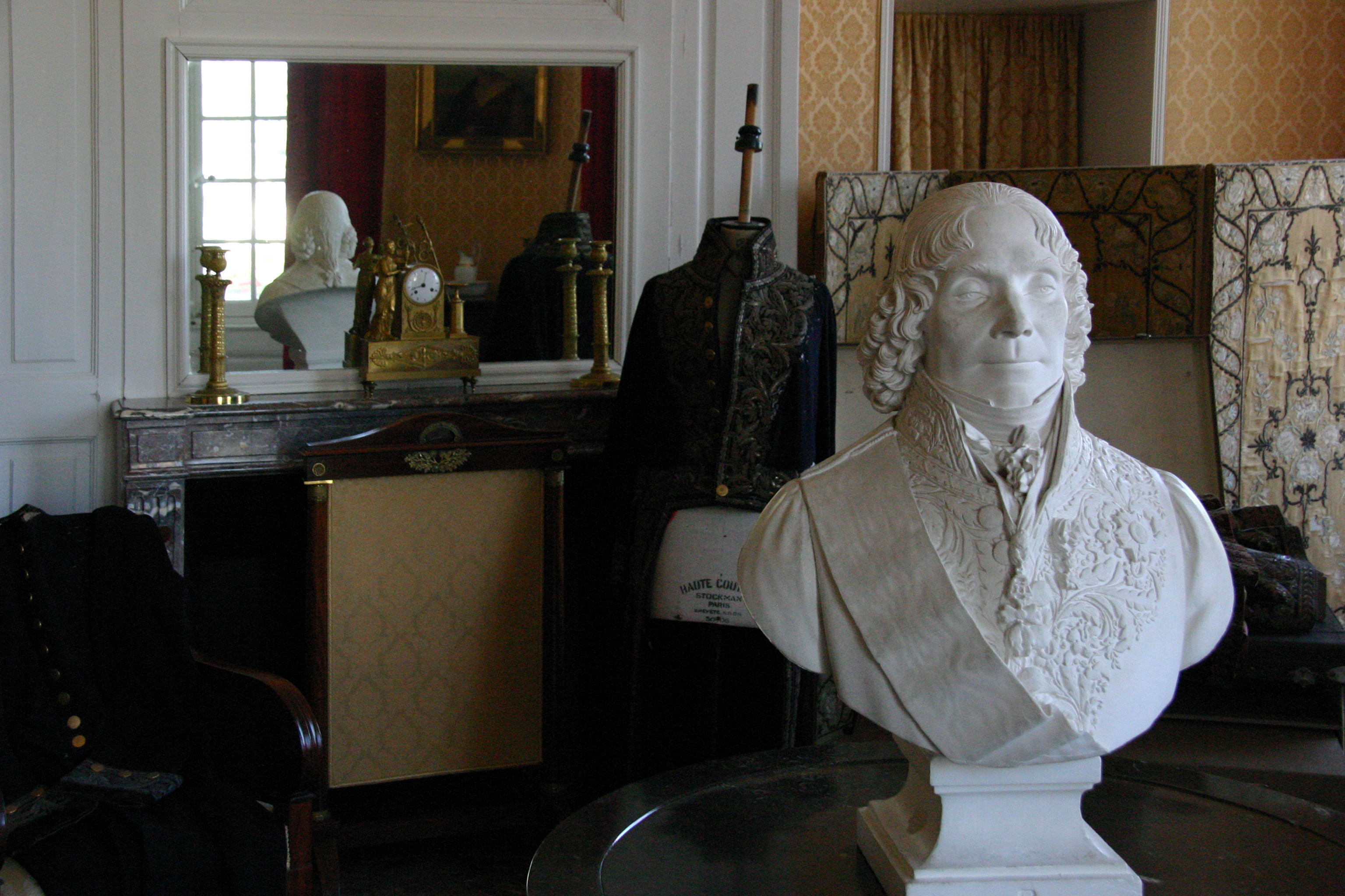 Schloss Valençay